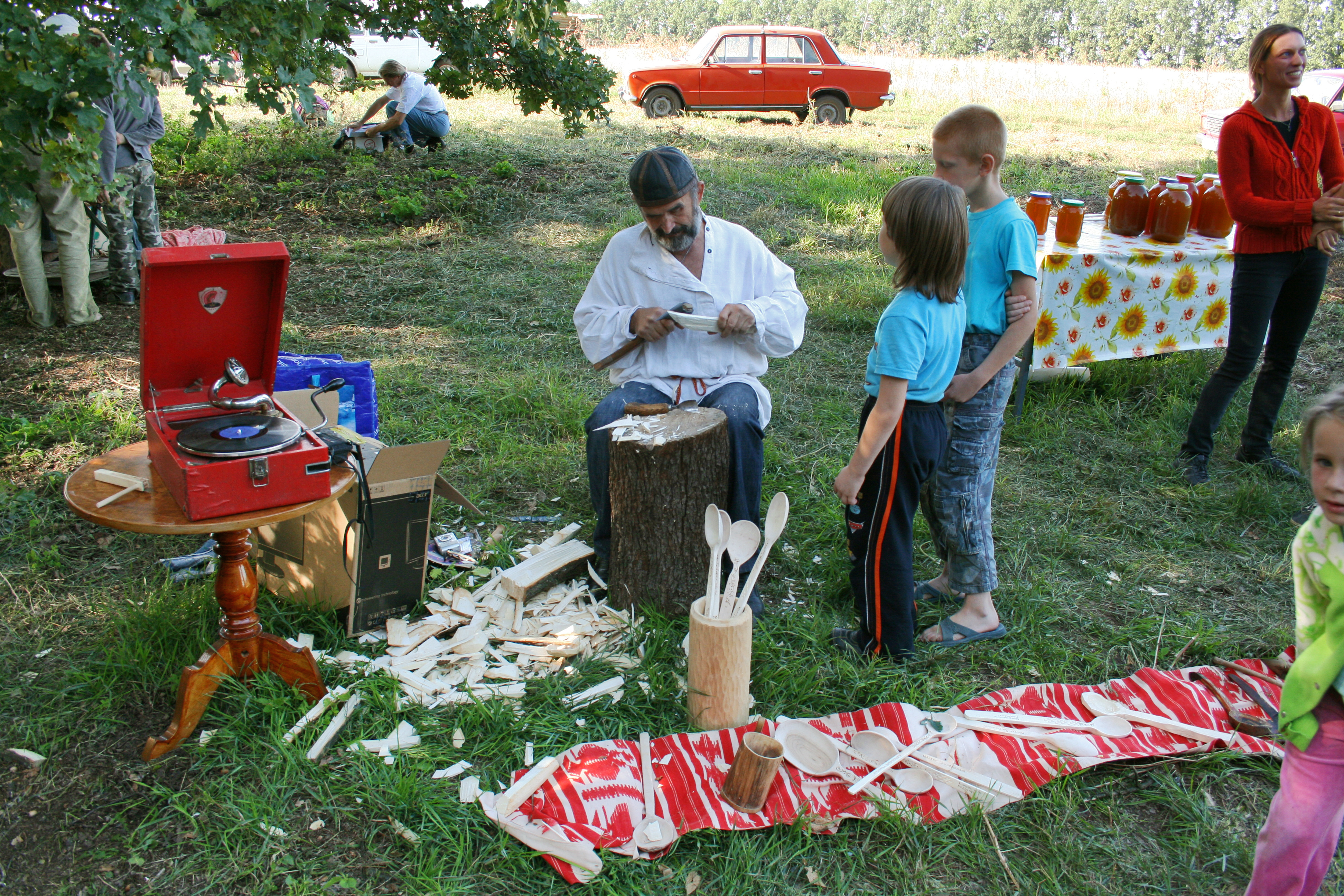 Ложкарь Ракитянский Николай Михайлович в гостях в Родовом экопоселении «Кореньские родники» на празнике Осенины. Сентябрь 2010.